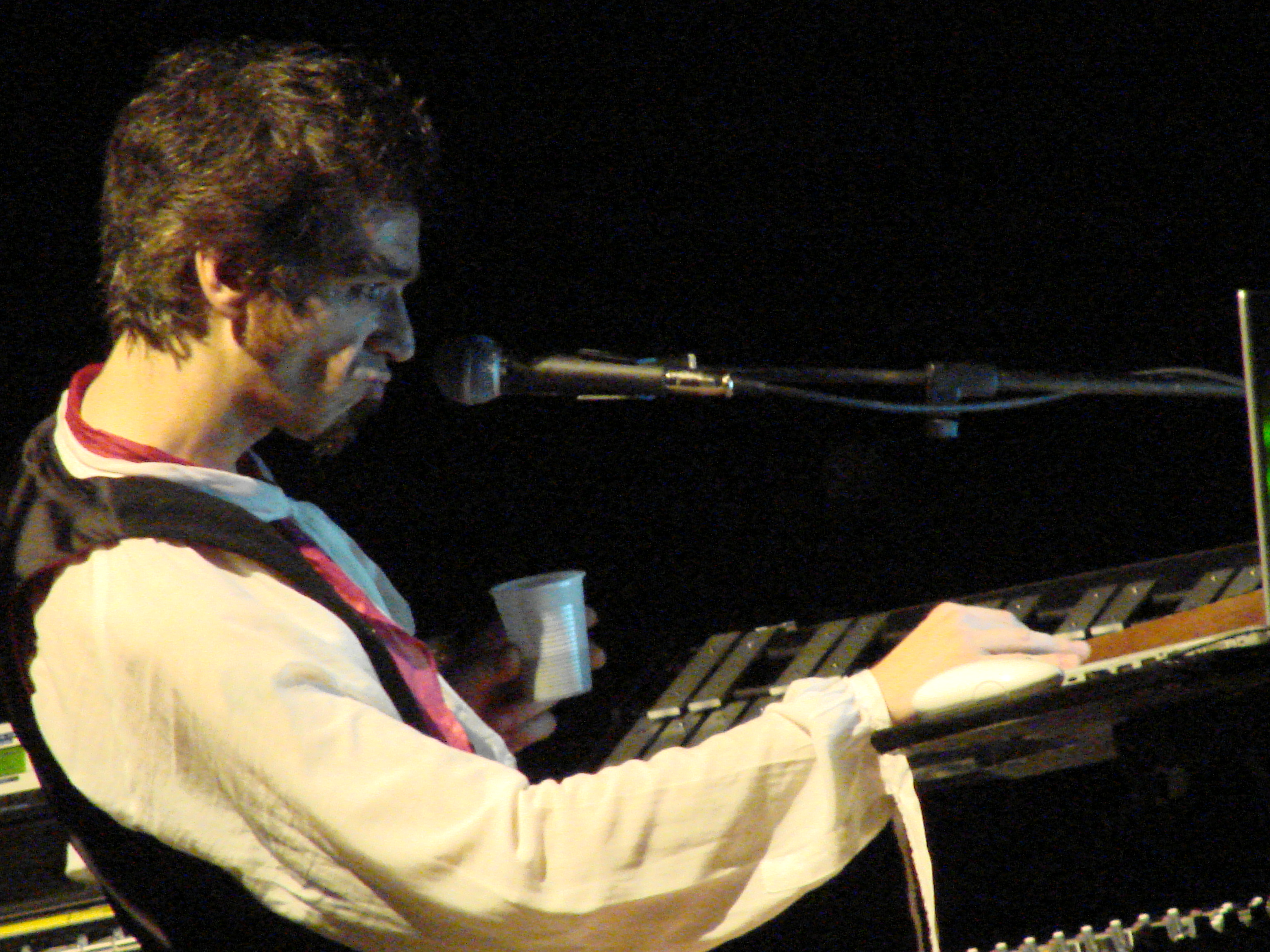 "E scopro che la fine ha sempre inizio dal luogo lampeggiante di un conflitto, nel quale il vincitore e lo sconfitto si scambiano di norma vizio e sfizio"